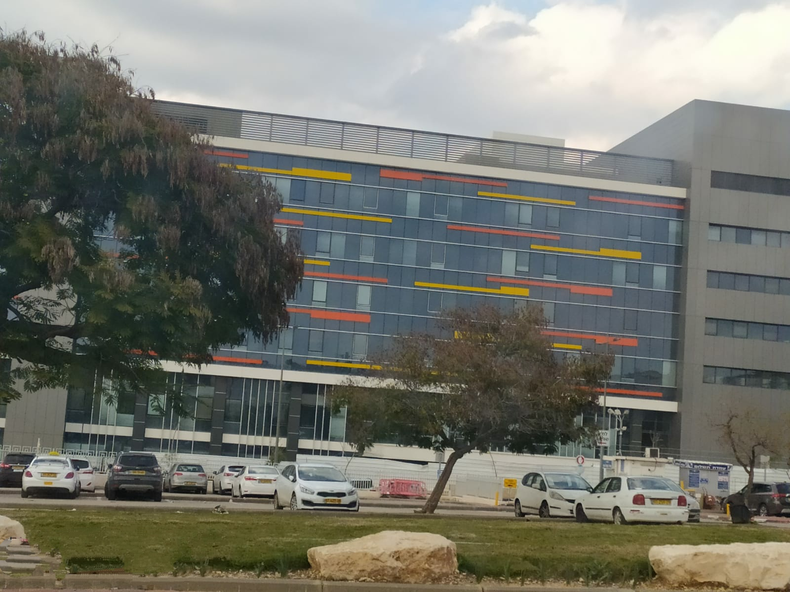 the new building 12/19